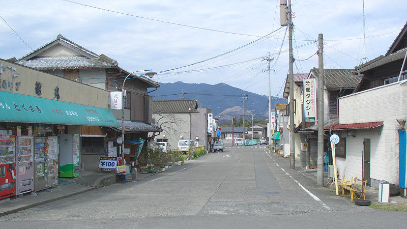 くま川鉄道湯前線ja:湯前駅 駅周辺 駅前広場から北側を見る。 中央の通りはja:熊本県道190号湯前停車場線、突き当たりがja:国道219号。 撮影者/著者/著作権保有者 : MK Products (本人がアップロード) 撮影日 : 2007/03/14 湯前駅用にアップロードした画像です。良い画像があれば別の画像に変えてください。